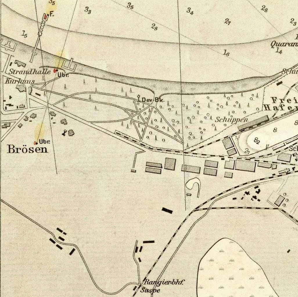 Brösen (Danzig), 1909.